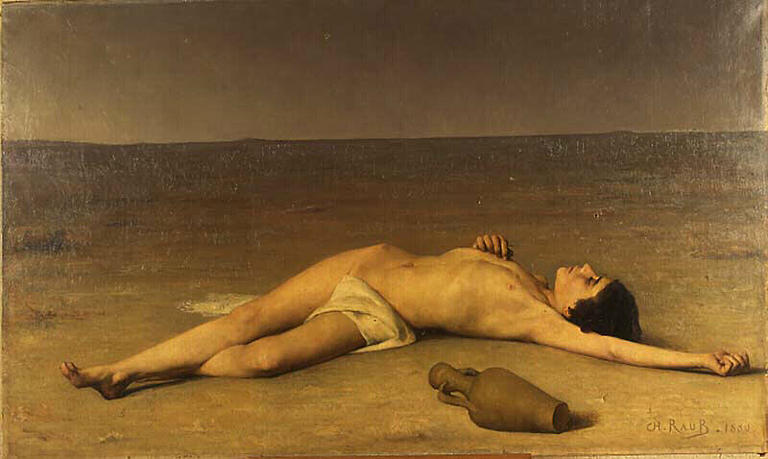 Ishmael